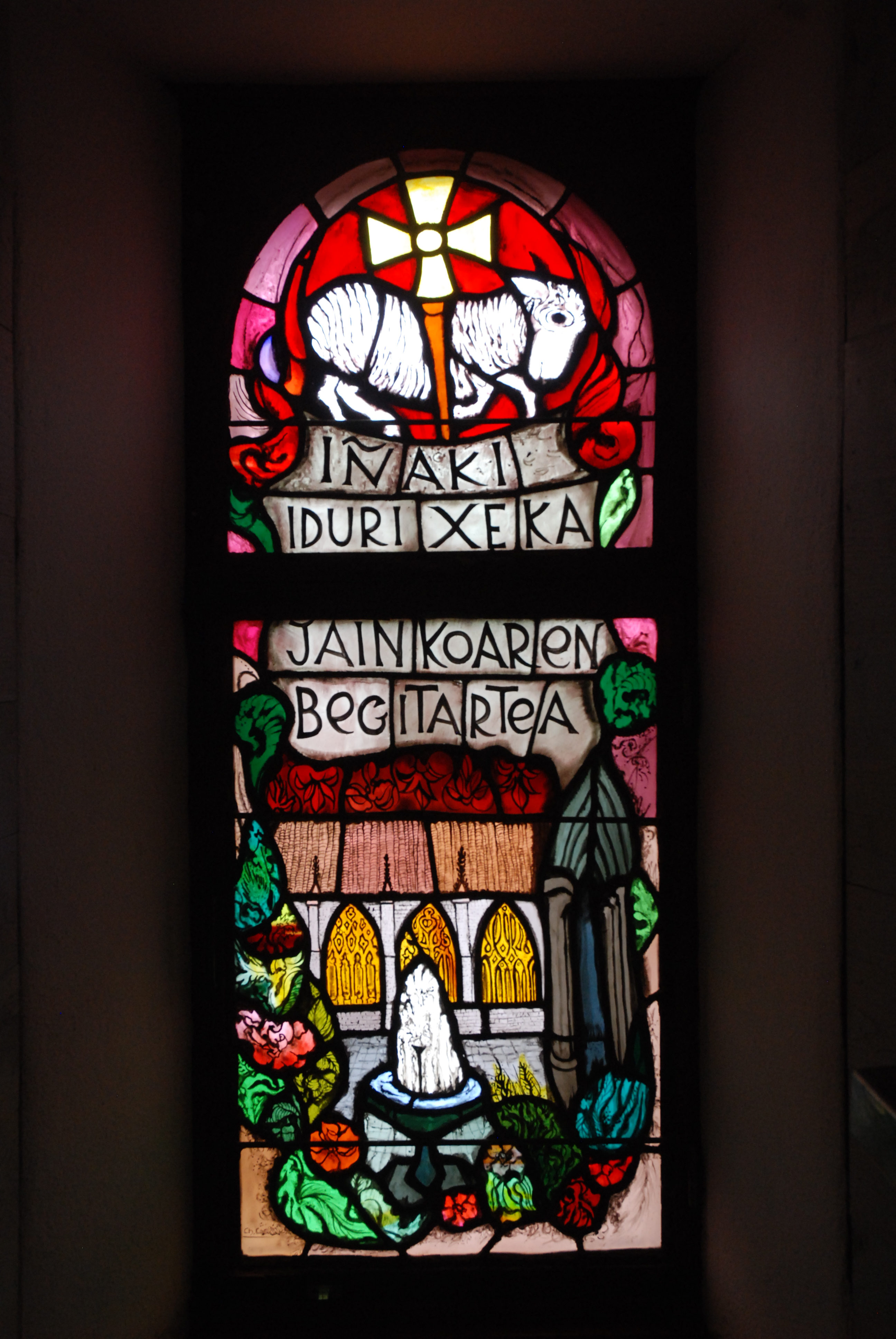 Vitrail dans l'église Saint-Pierre à Juxue